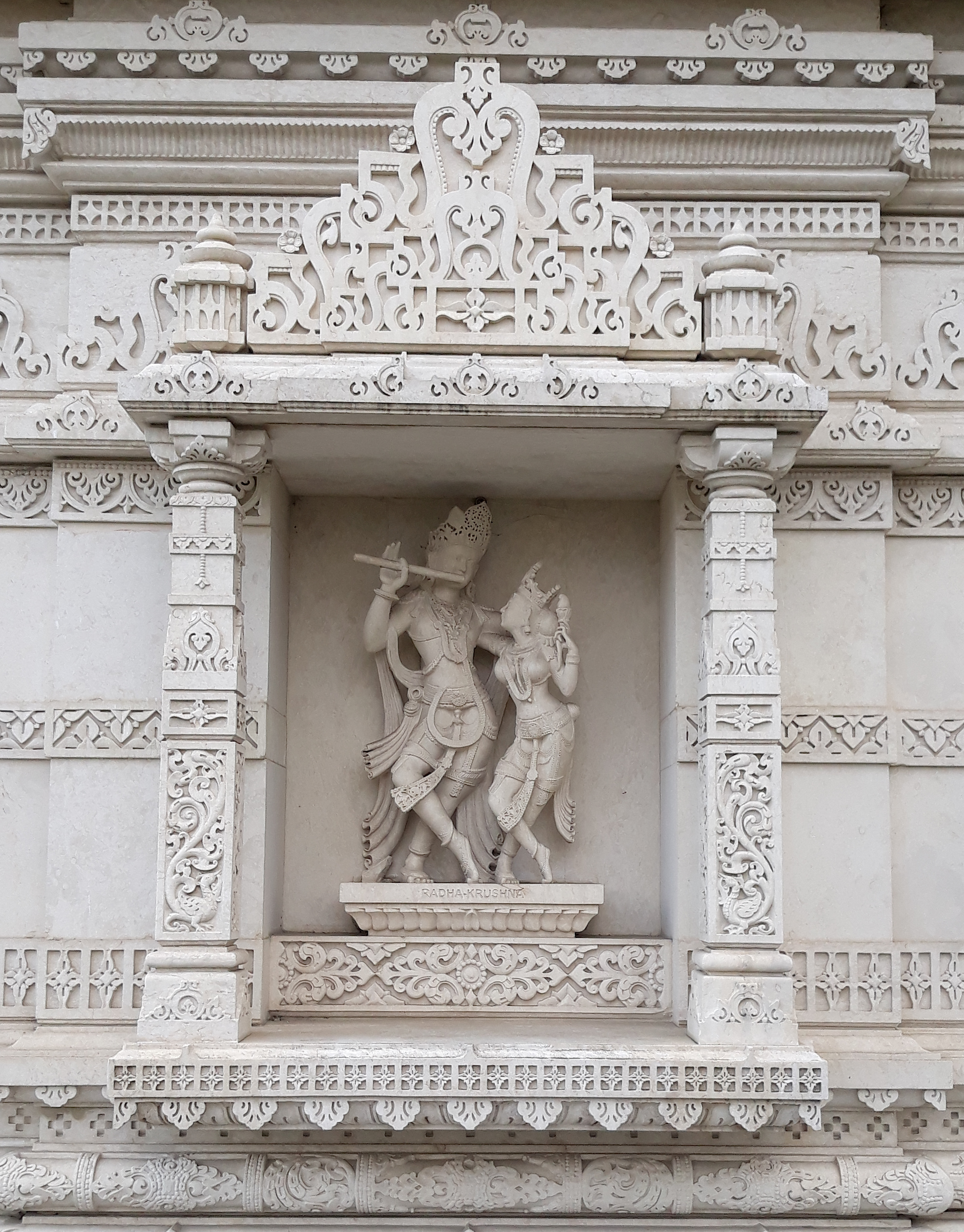 Dettaglio del Shri Swaminarayan Mandir di Londra